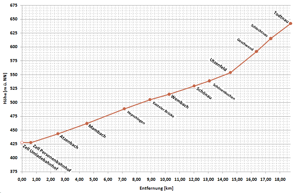 vereinfachtes Höhenprofil der Bahnstrecke Zell im Wiesental–Todtnau